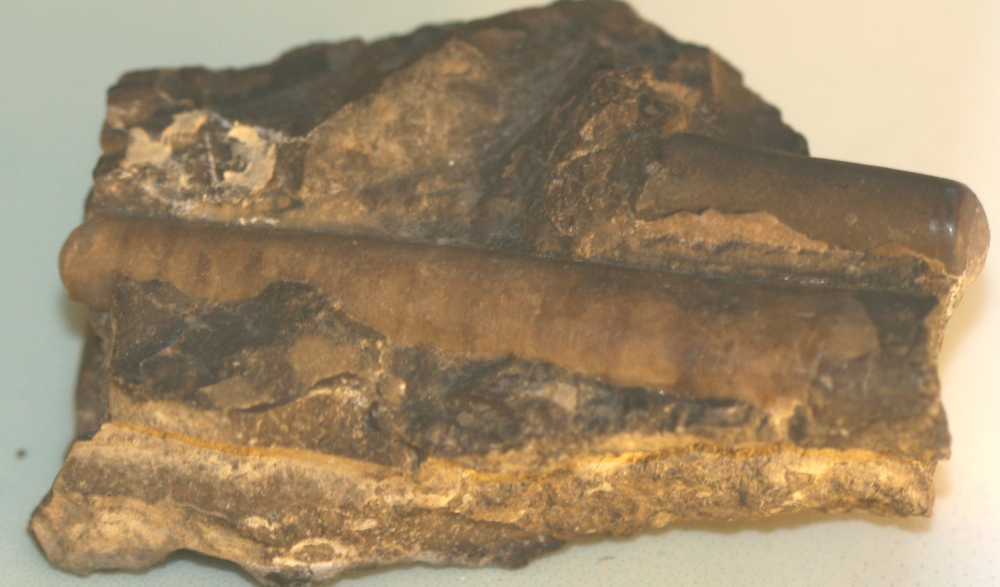 Cefalópodos:ortocerátidos